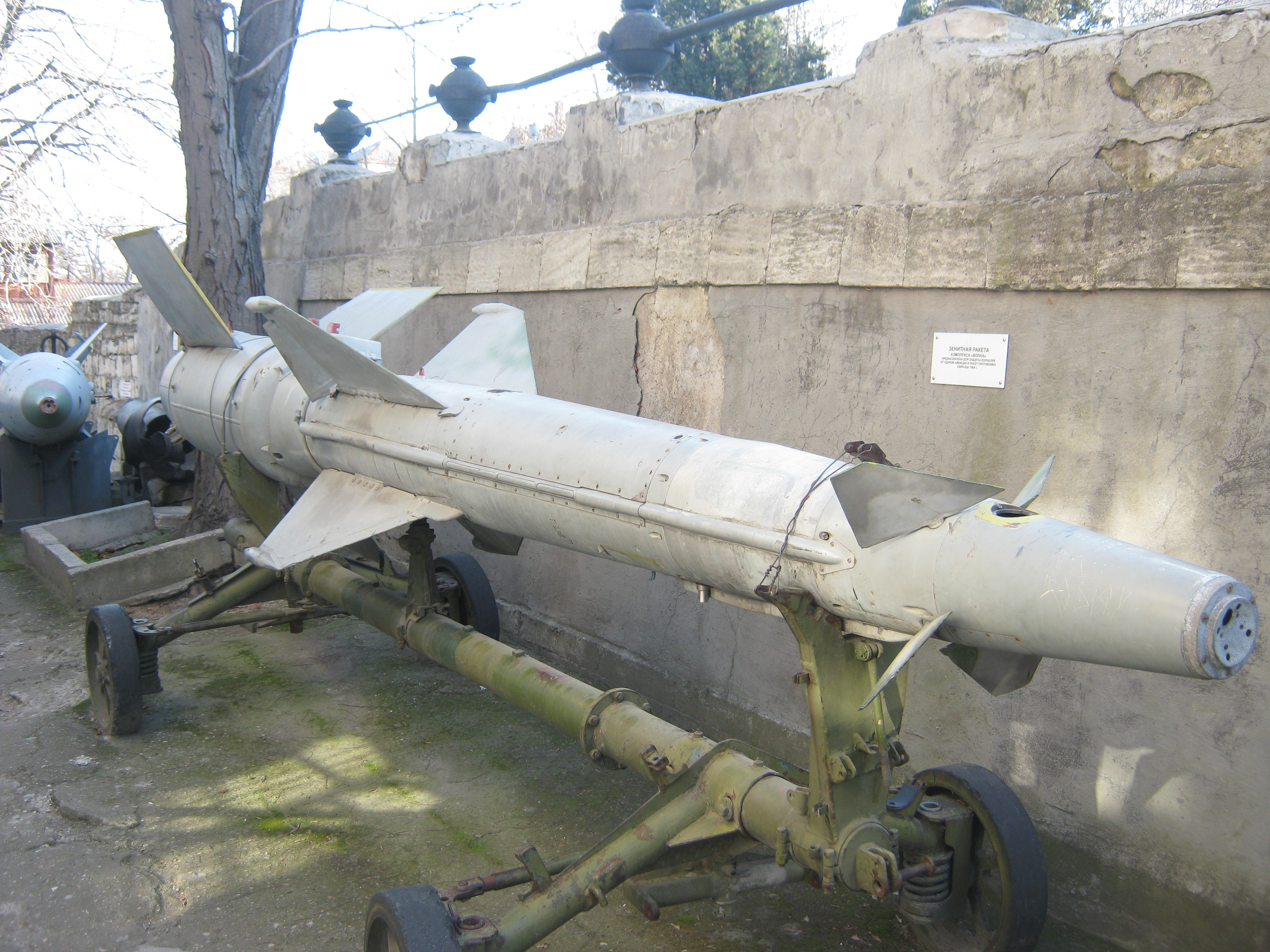 Ракета ЗРК Волна в экспозиции музея Черноморского флота в Севастополе